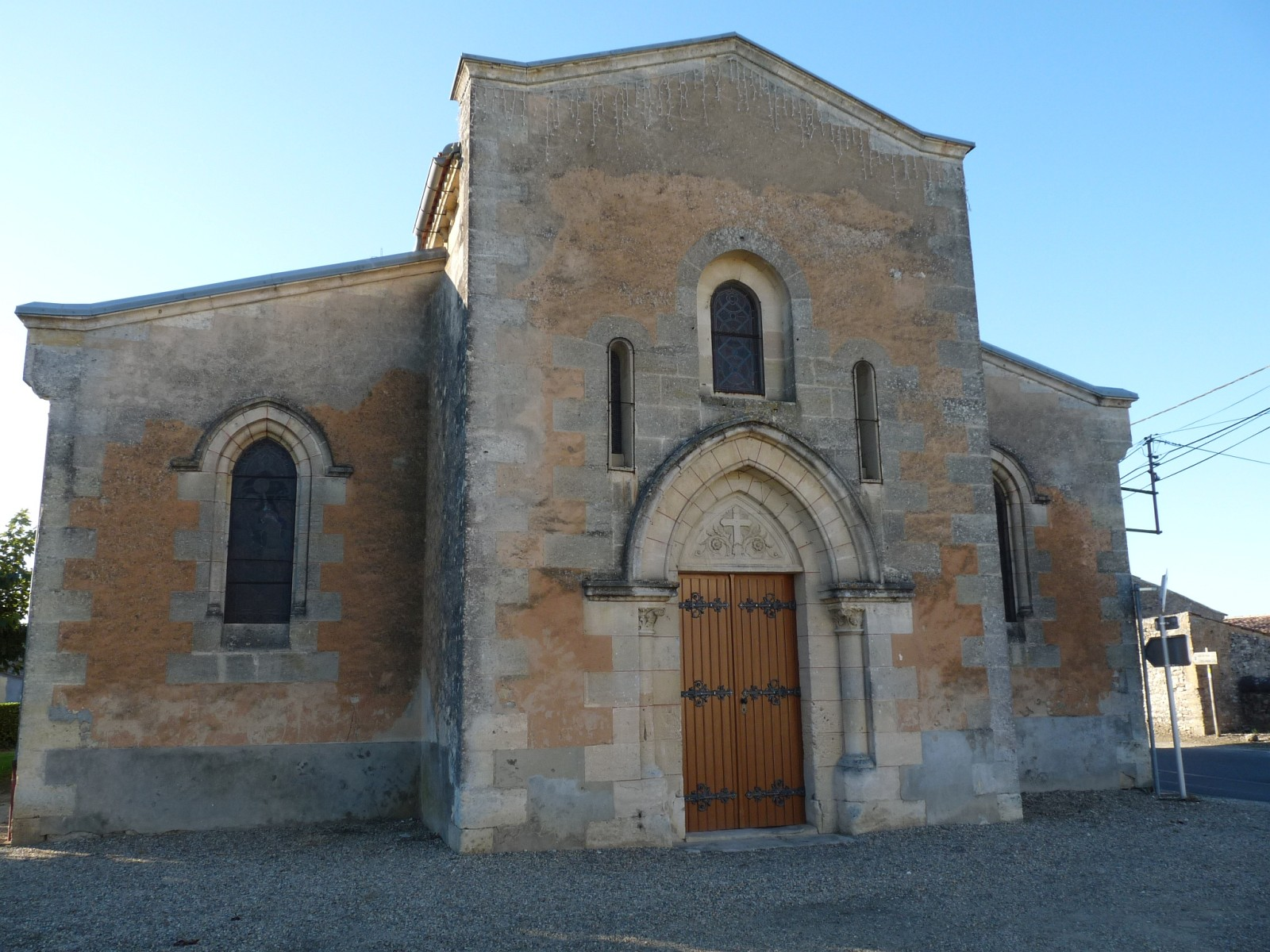 Eglise de Saint-Seurin-de-Cursac, Gironde, France